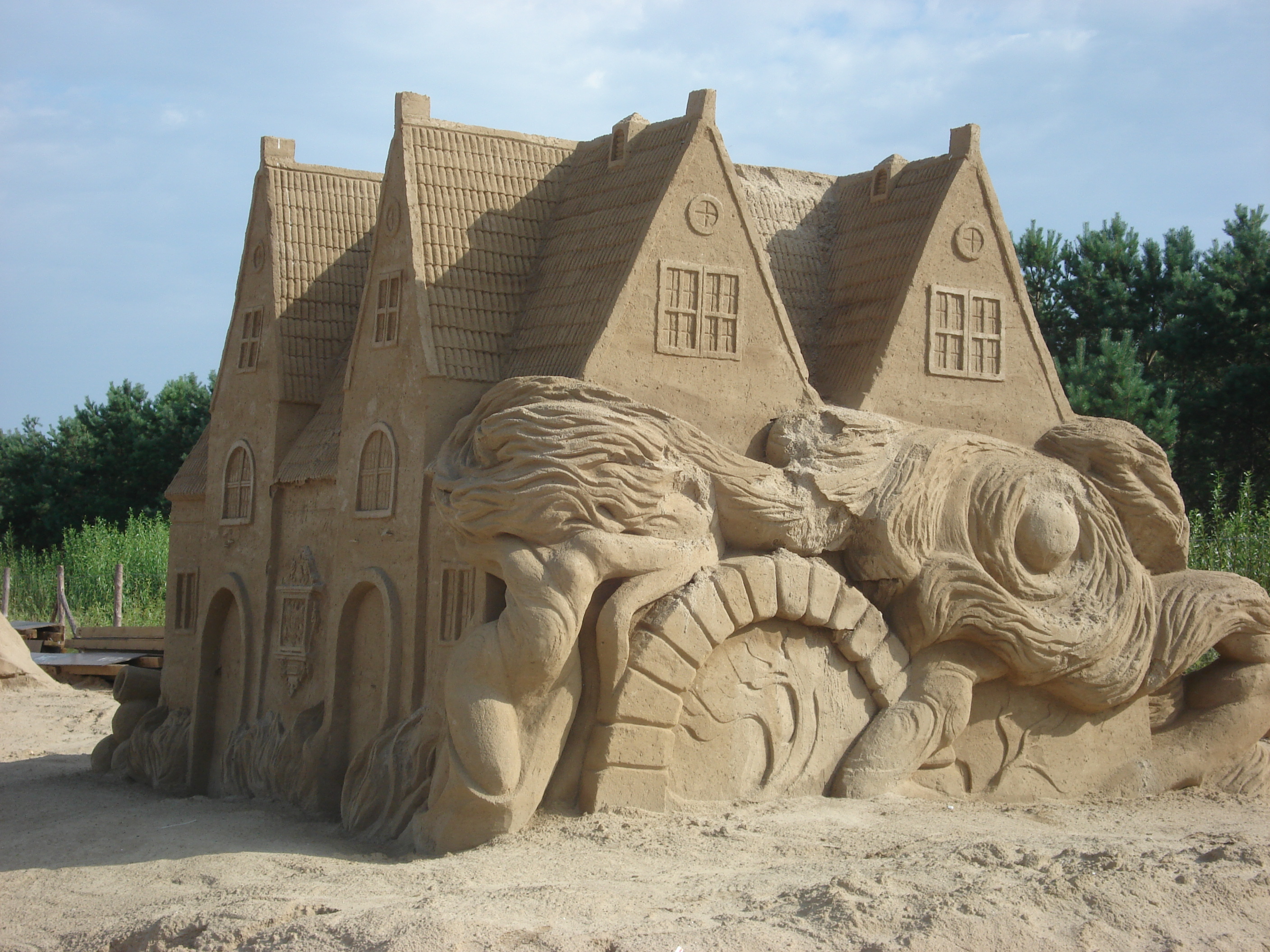 Sandskulpturen am Danziger Strand.